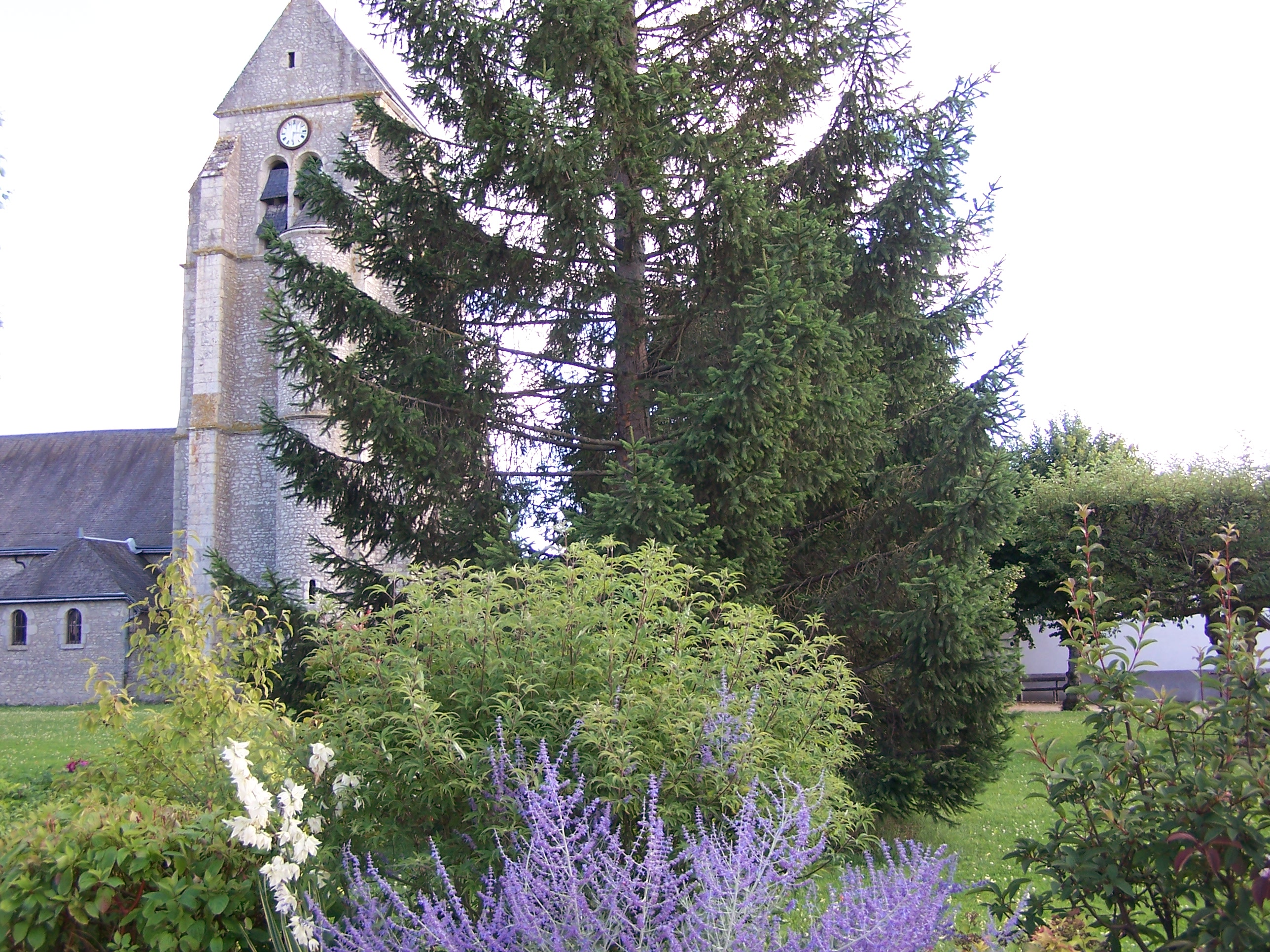 Church of VENNECY